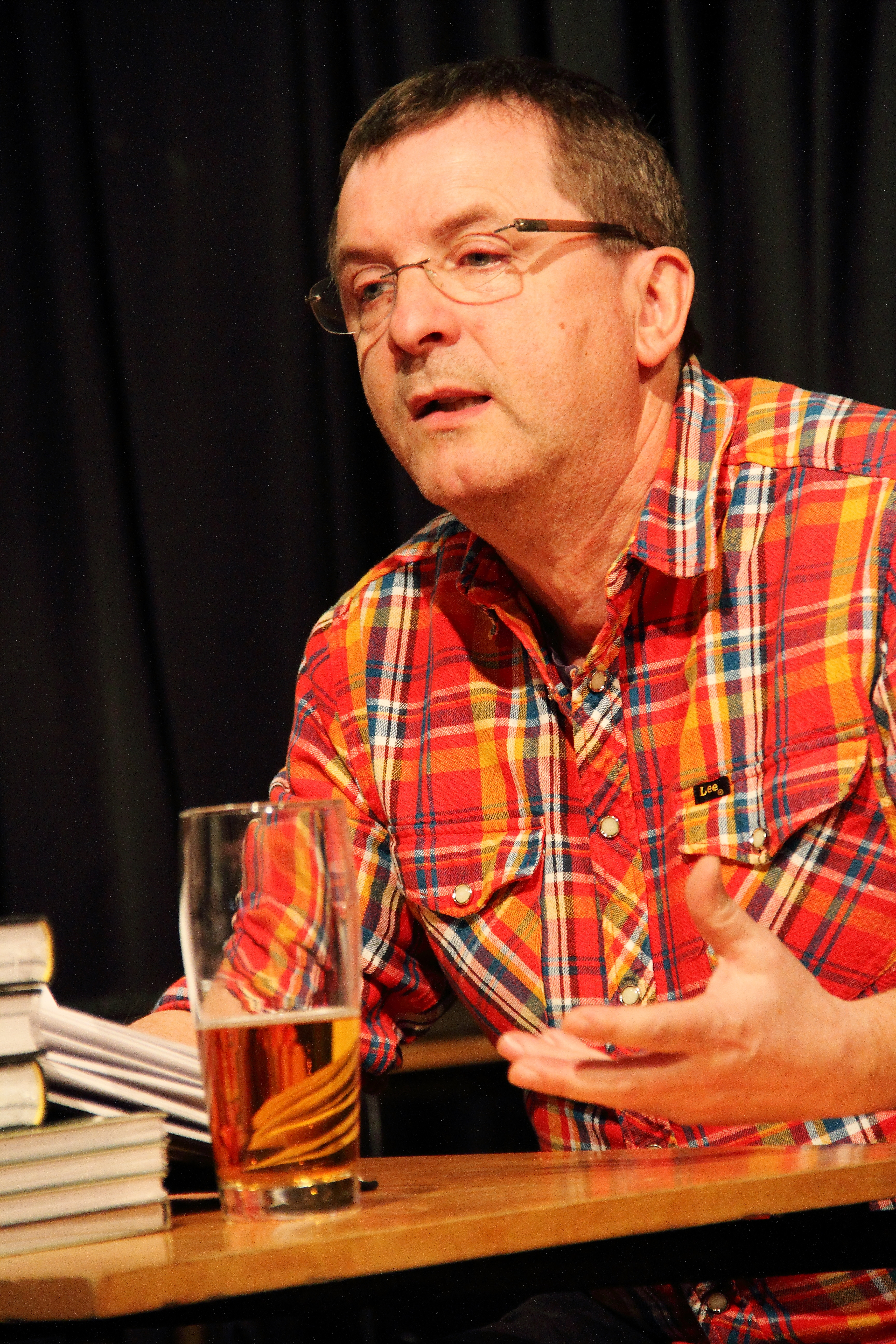 Der Radiomoderator und Autor Karl Bruckmaier bei einer Lesung im Club W71, 2018.